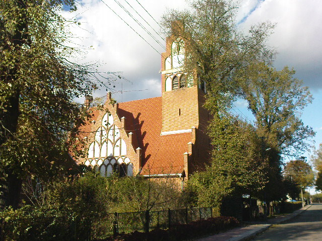 Wejsuny - neogotycki kościół ewangelicki